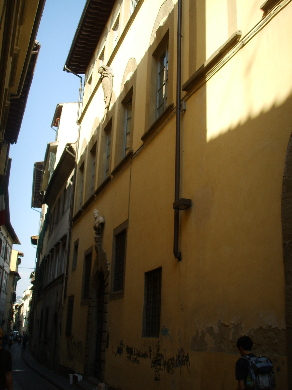 Palazzo_del Giambologna in Florence